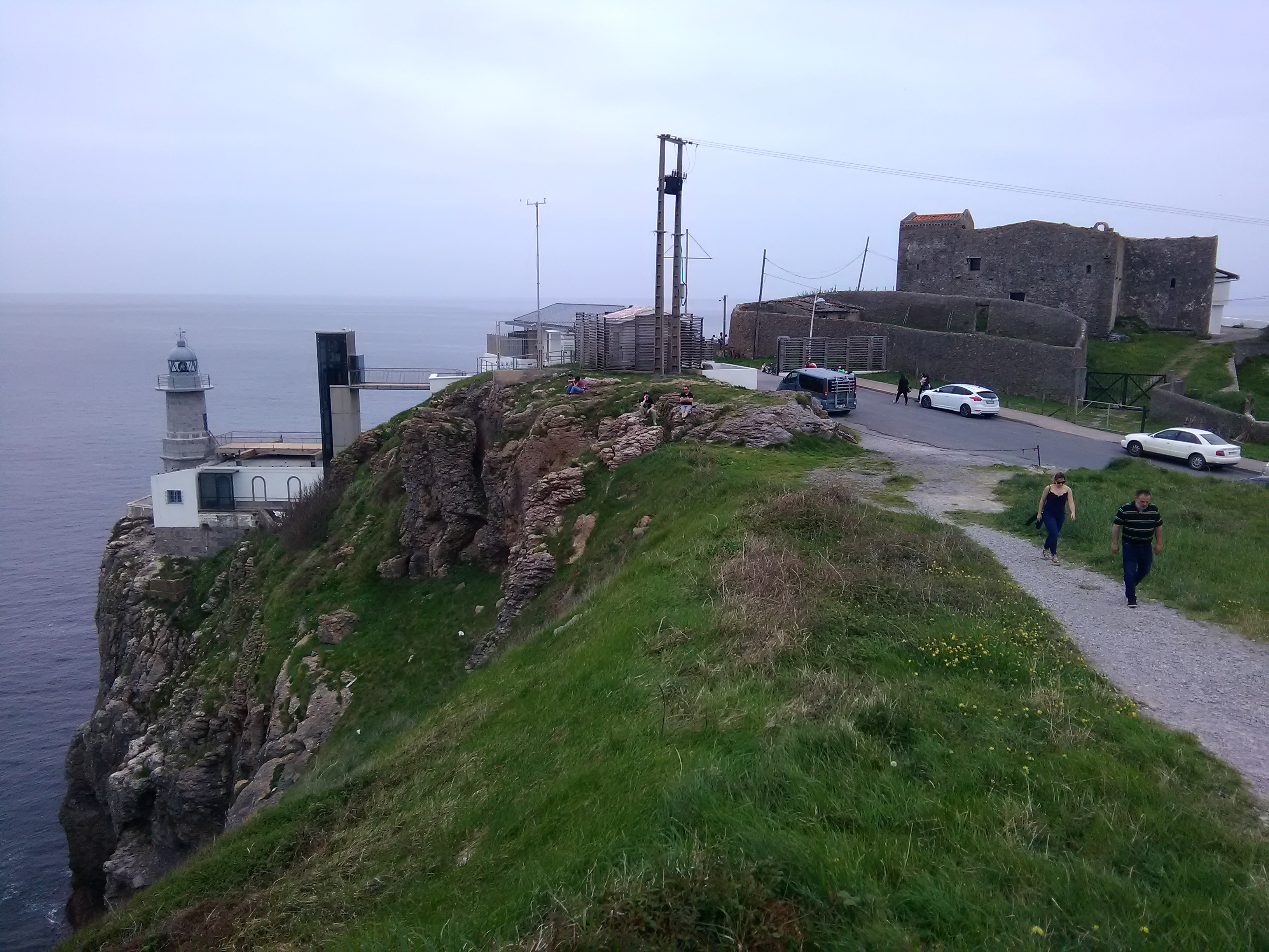 Antzoriz lurmuturra (Lekeitio). Santa Katalinako itsasargia eta baseliza.